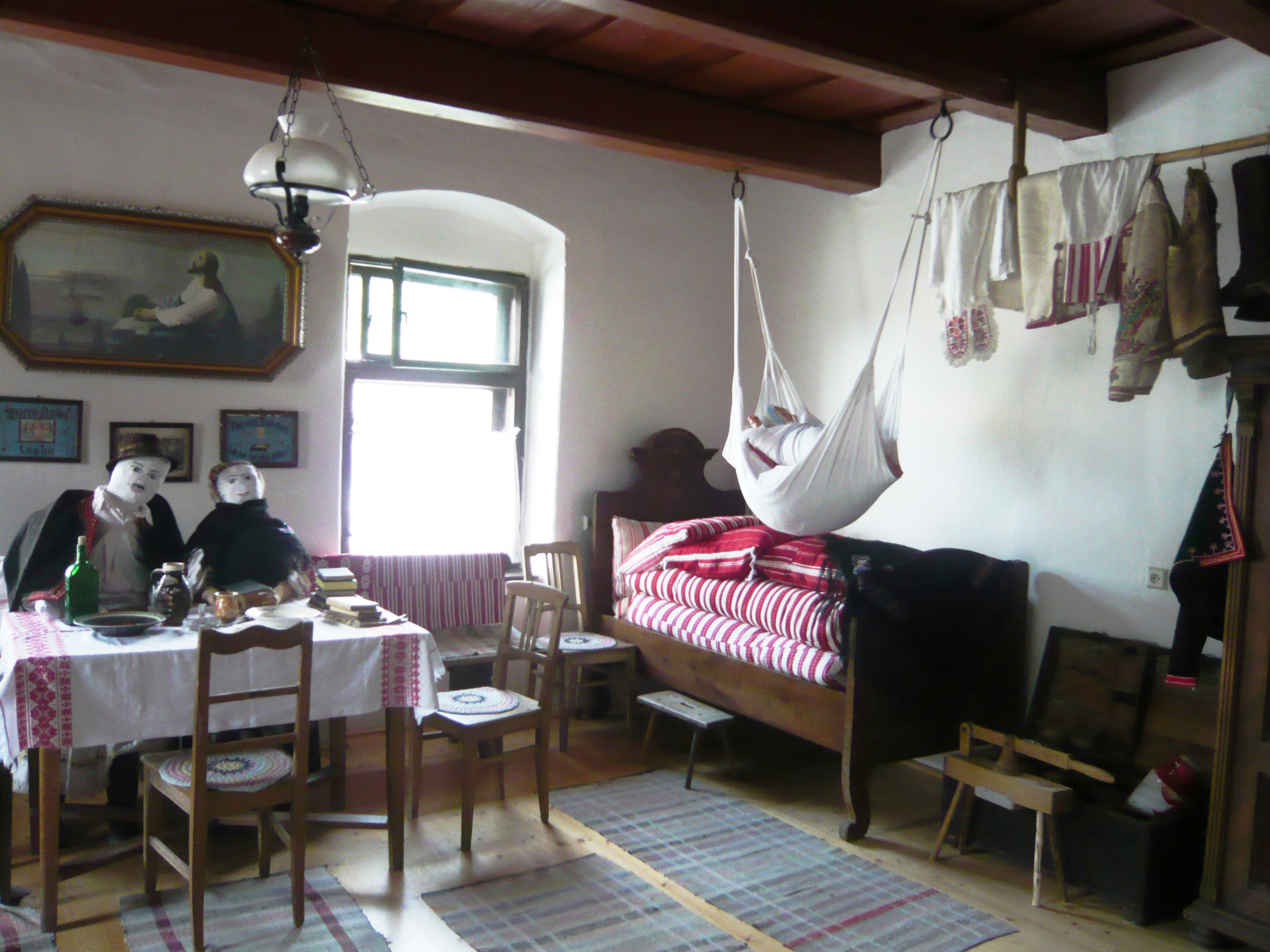 Izba ľudových tradícií v obci Strelníky